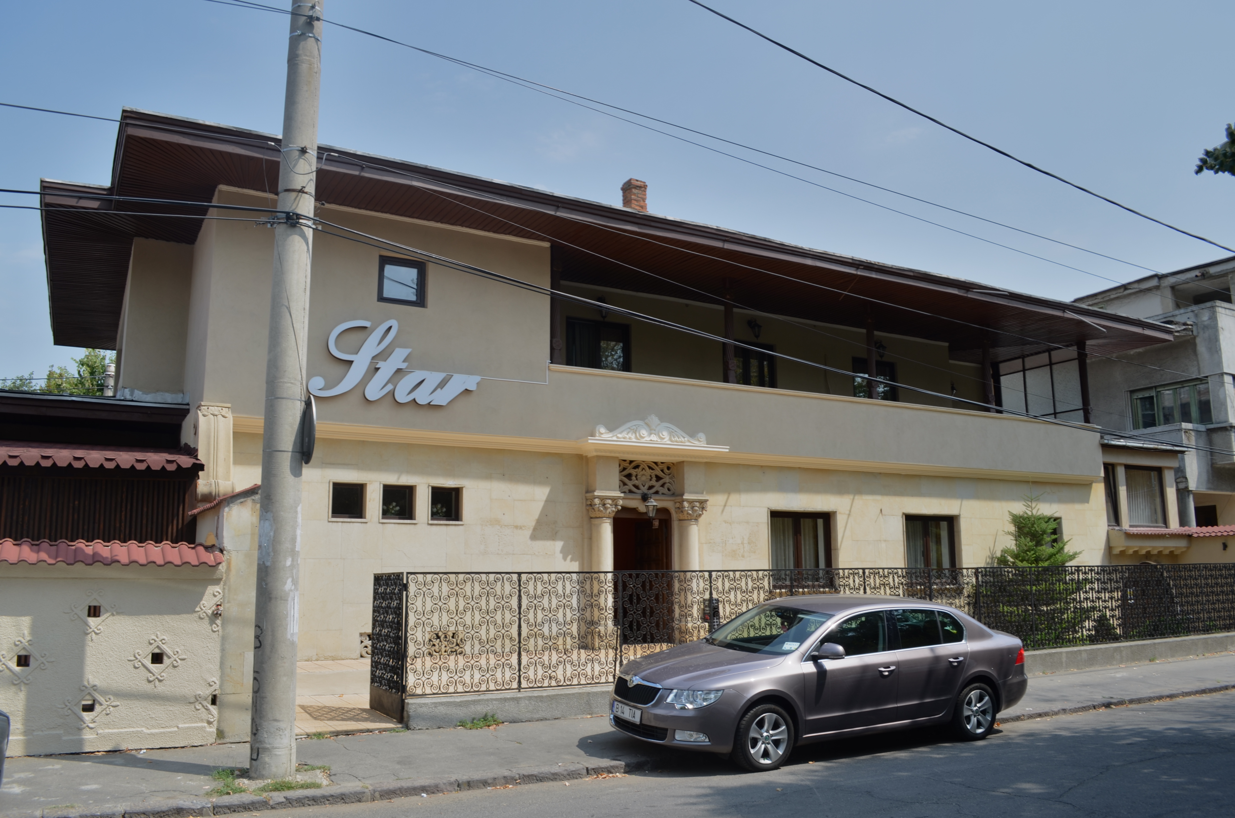 Hotel-Restaurant "Star", Str. Bogdan Petriceicu Hasdeu nr. 1, Ploiești